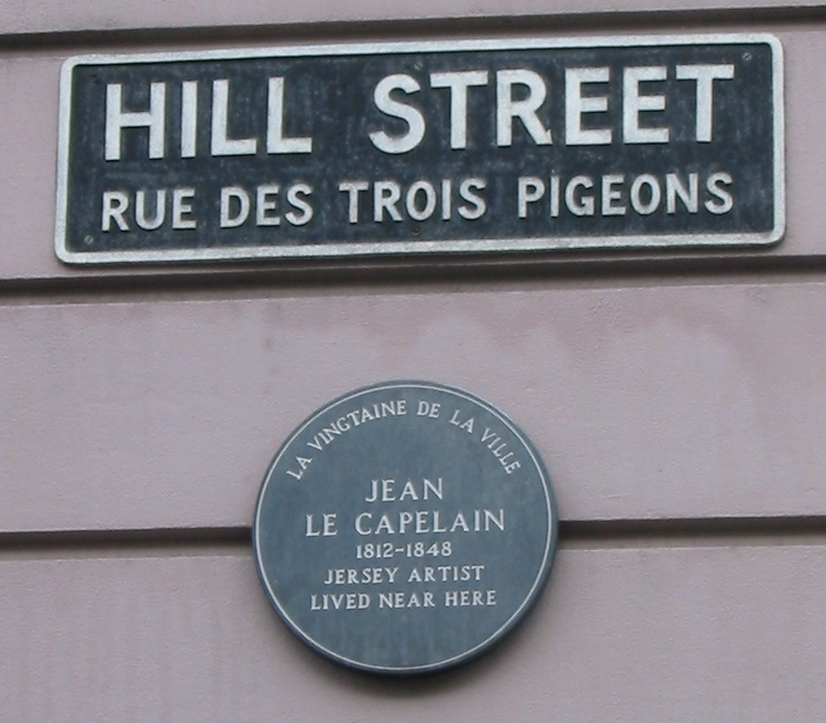 Hill Street/Rue des Trois Pigeons, Saint Helier, Jersey. Plaque for artist Jean Le Capelain